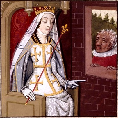 Jeanne Ière de Naples, dite la « Reine Jeanne », comtesse de Provence (1326-1382) Boccace. De mulieribus claris. Cognac. XVe - XVIe siècle. BNF (Bibliothèque Nationale de France) cote François 599. 93v. (Remarquée et empruntée sur le site " page "Généalogie des Comtes de Provence"))